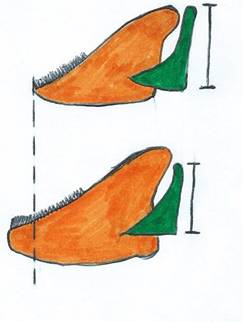 Différences entre les mâchoires des Cichlidés entre la longueur de la mâchoire inférieure et la hauteur du processus articulaire